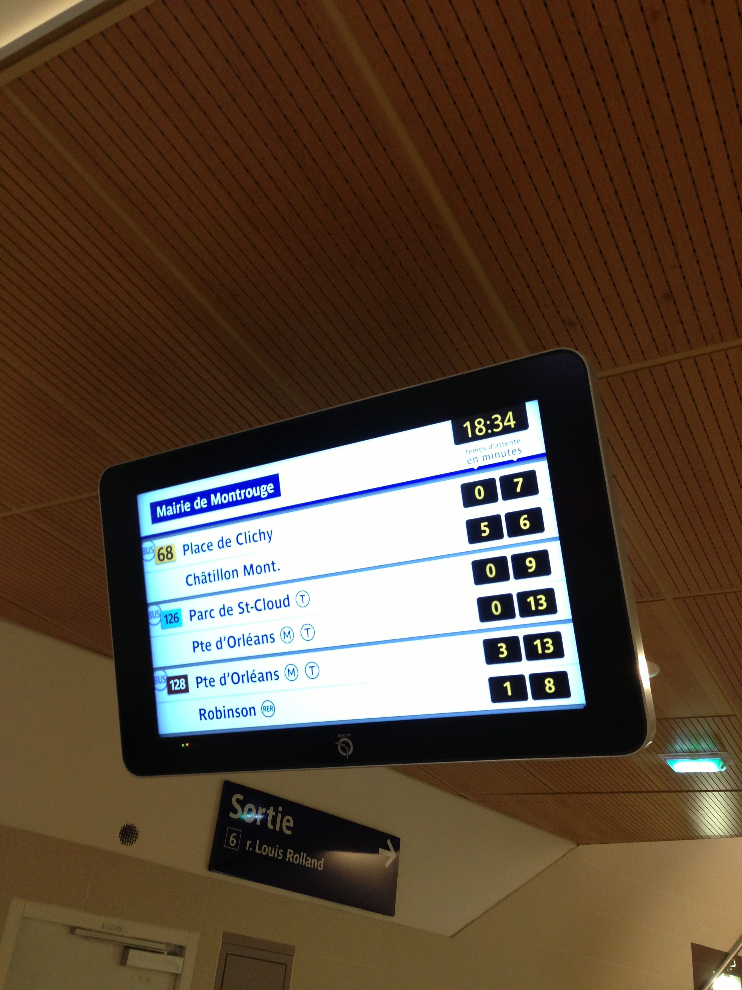 Ecran IMAGE à la station Mairie de Montrouge (ligne 4 du métro de Paris)